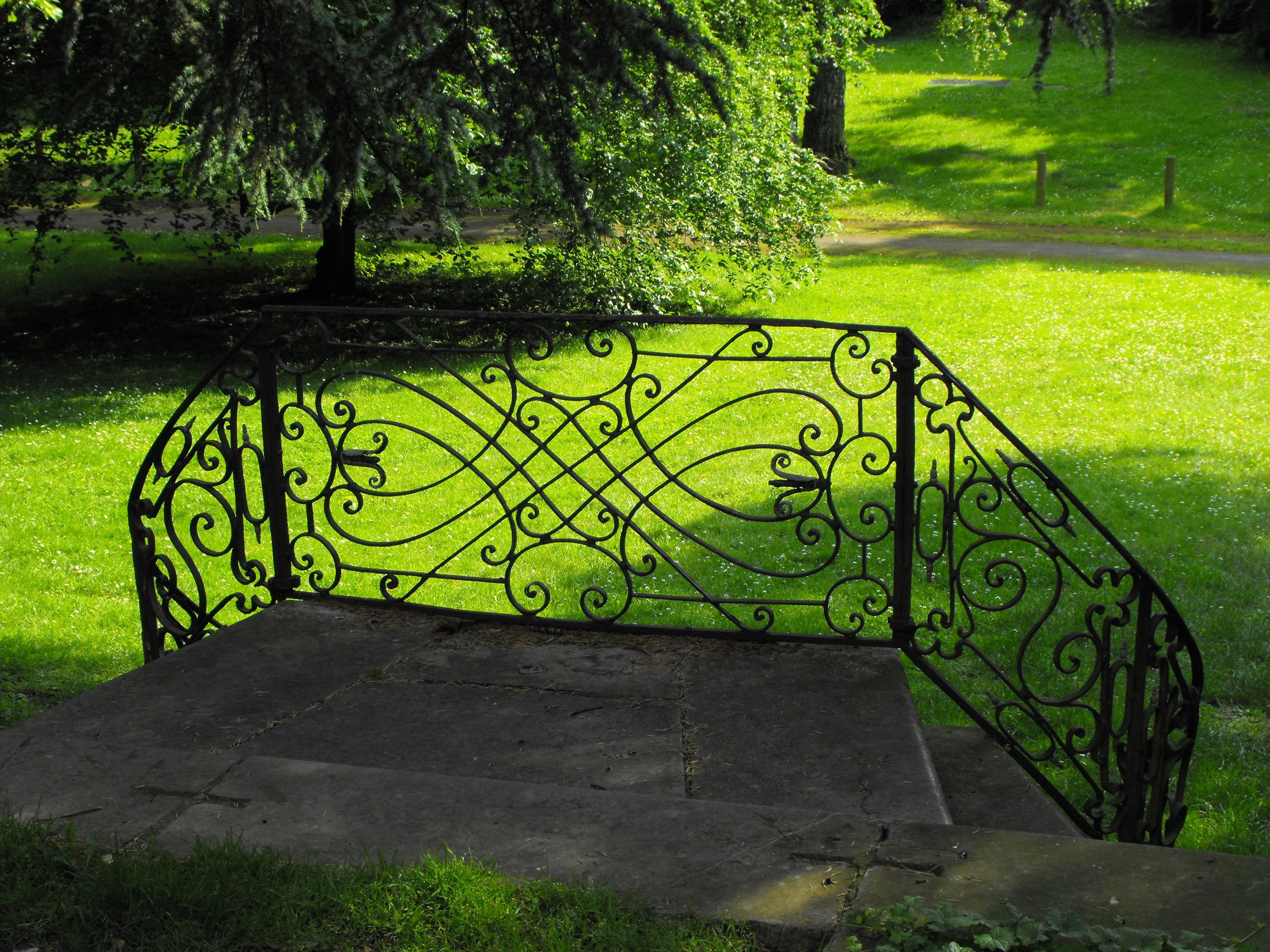 Geländer der Guaita'schen Gartentreppe im Kurpark Aachen